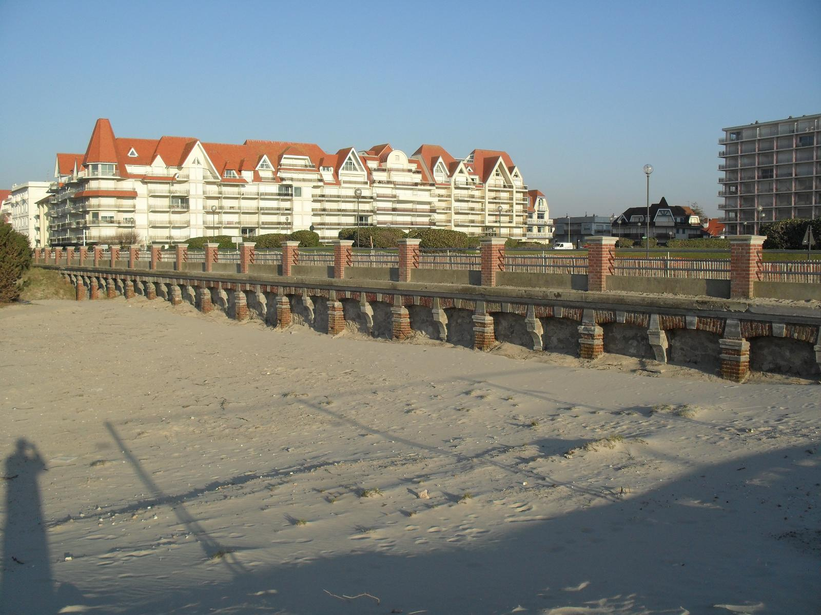 Vue Actuelle de la Digue-Promenade de Paul Ridoux - Le Touquet-Paris-Plage Au départ longue de 400m, l'essentiel de la digue est enseveli par les dunes de sable. Construite en 1905 par l'architecte Arrageois Paul Ridoux qui a fait l'acquisition de la pointe nord et qui souhaitait protéger les futures constructions de la mer et du sable.